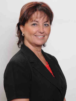 Ximena Vidal Lázaro